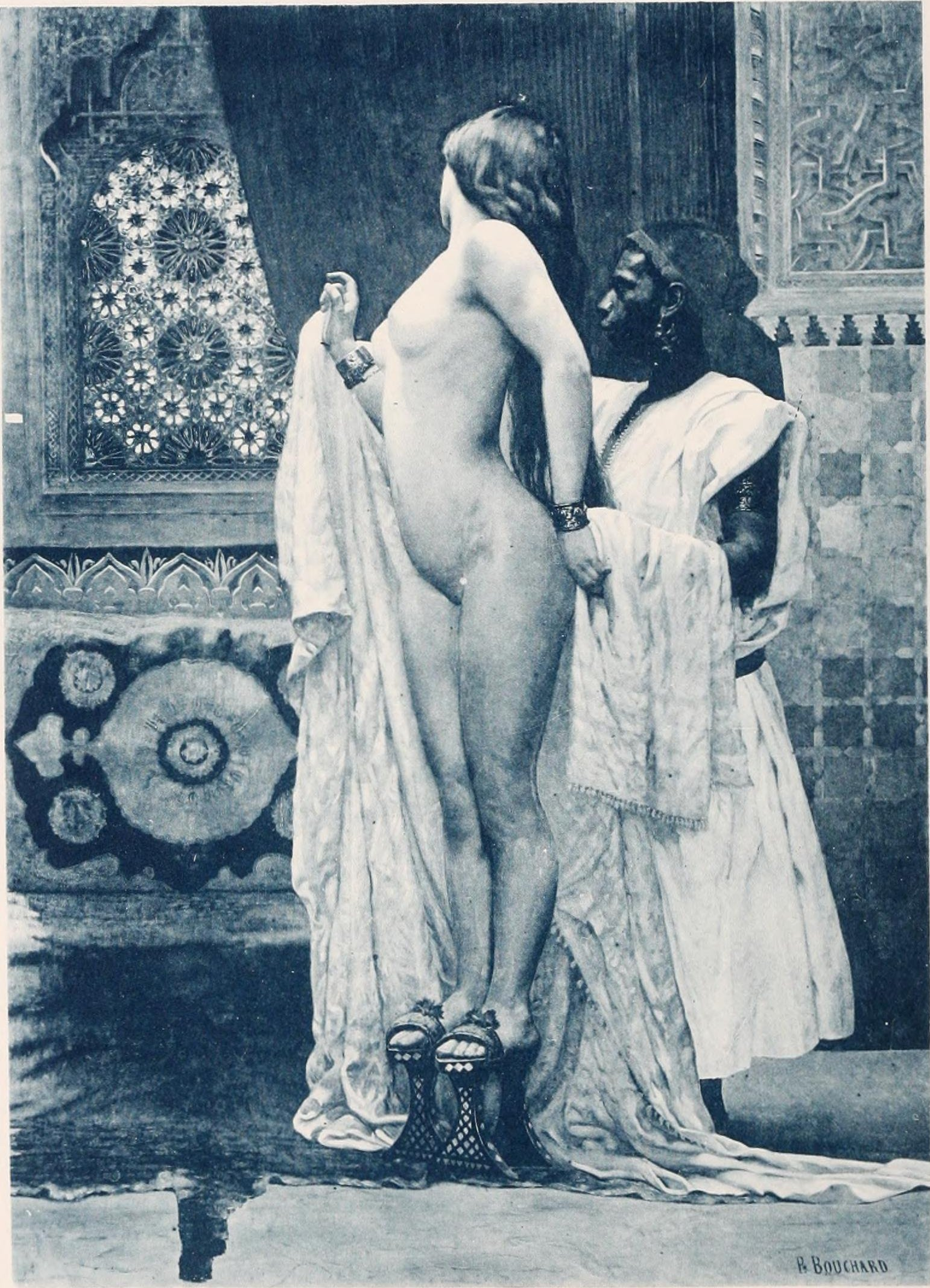 Après le bain